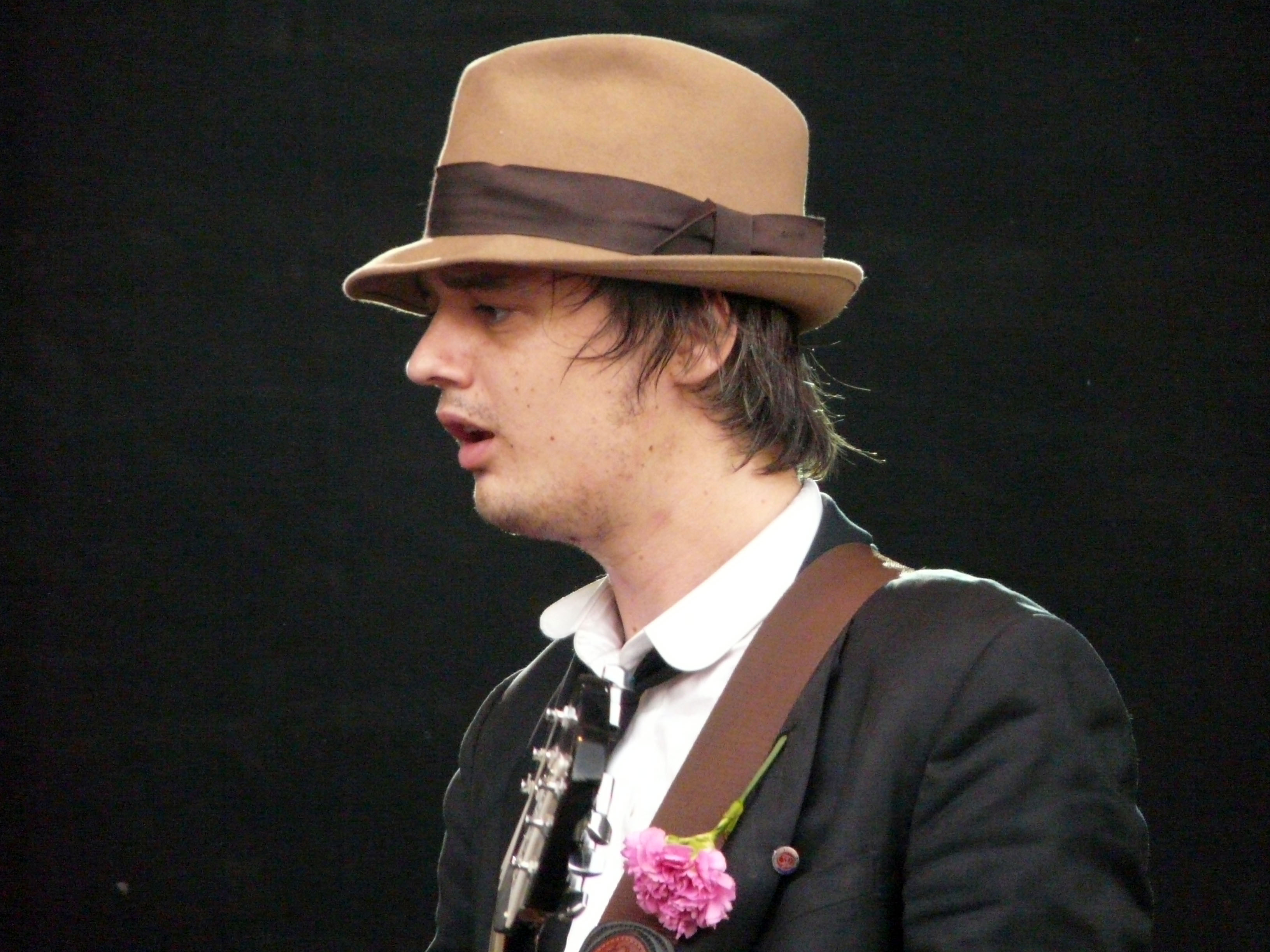 Pete Doherty, de Babyshambles, durante su actuación en el Saturday Night Fiber del 19 de julio de Madrid.